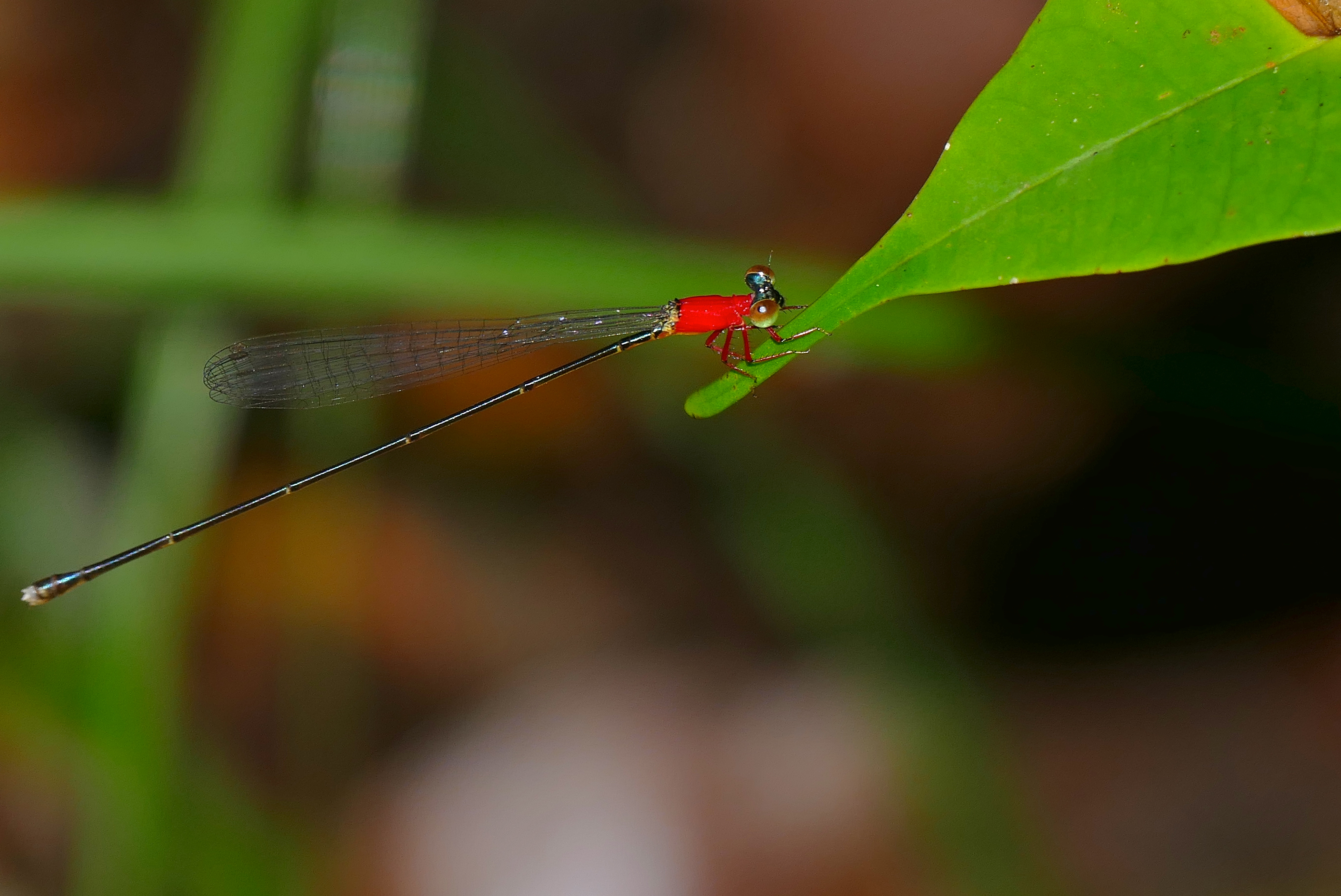 Mulu NP, Sarawak, MALAYSIA